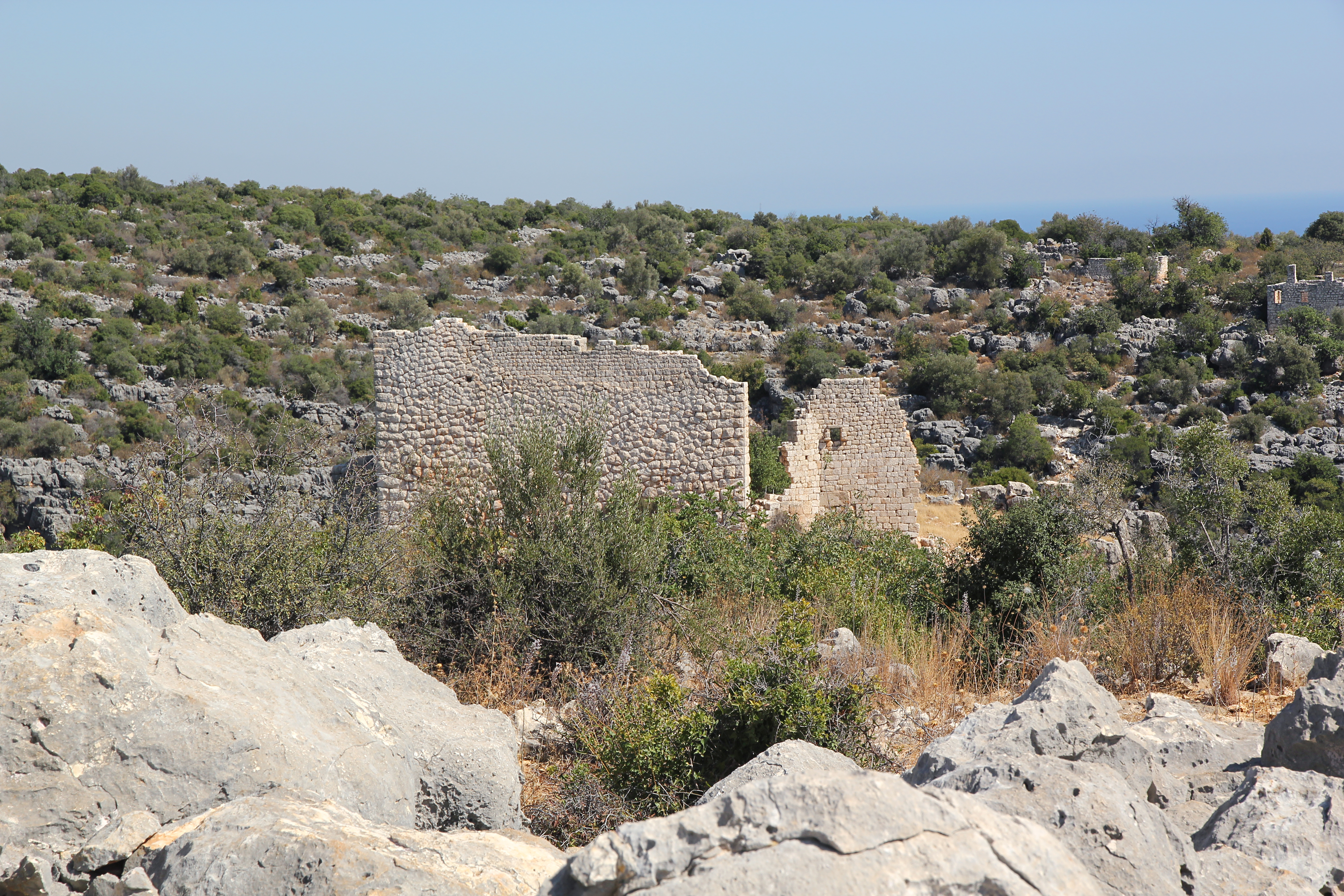 Hisarın, römisch-frühbyzantinische Siedlung im Rauhen Kilikien, Südtürkei, Befestigungsanlage von Westen